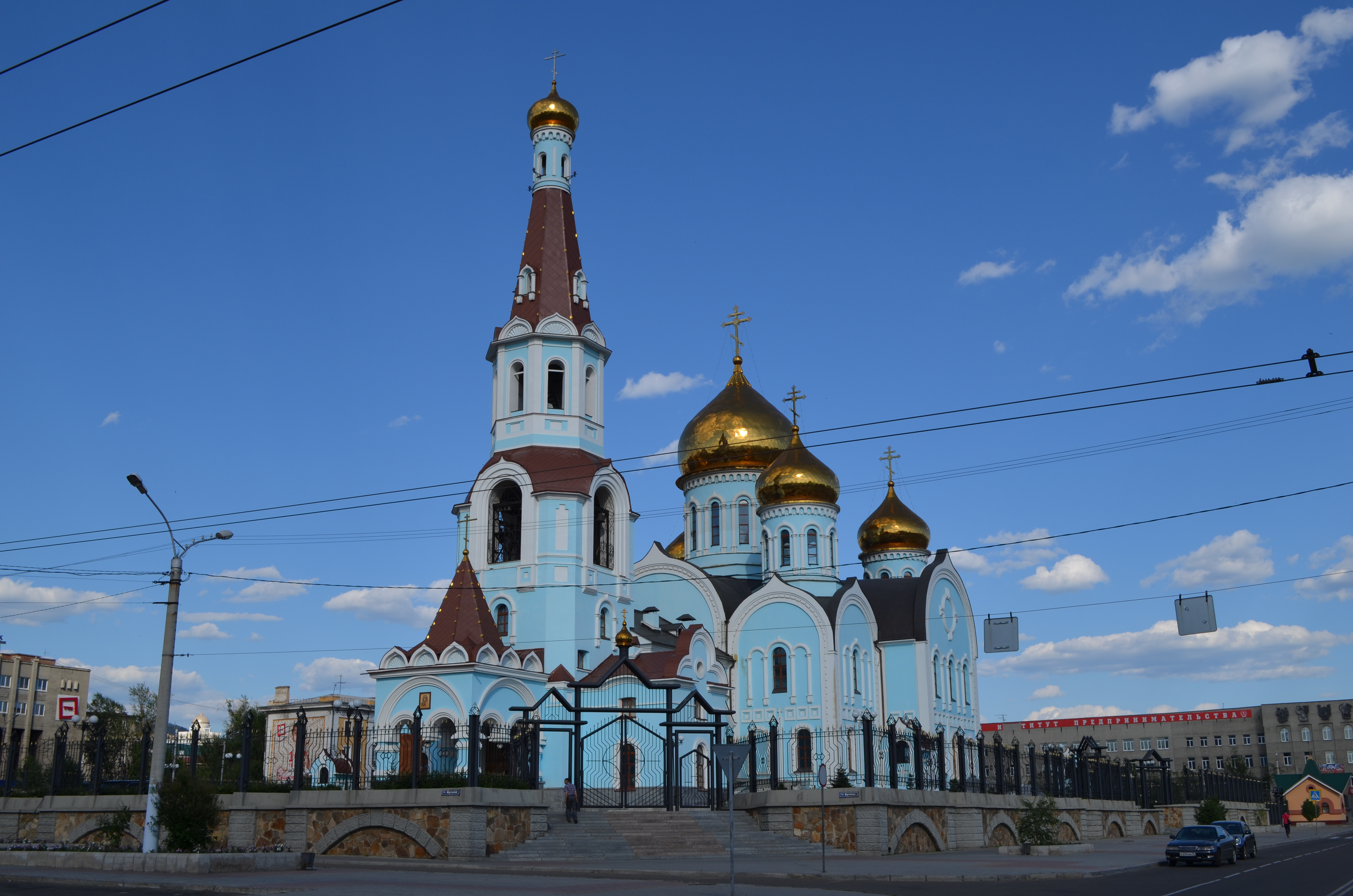 снимки конца июня - начала июля 2015 г.